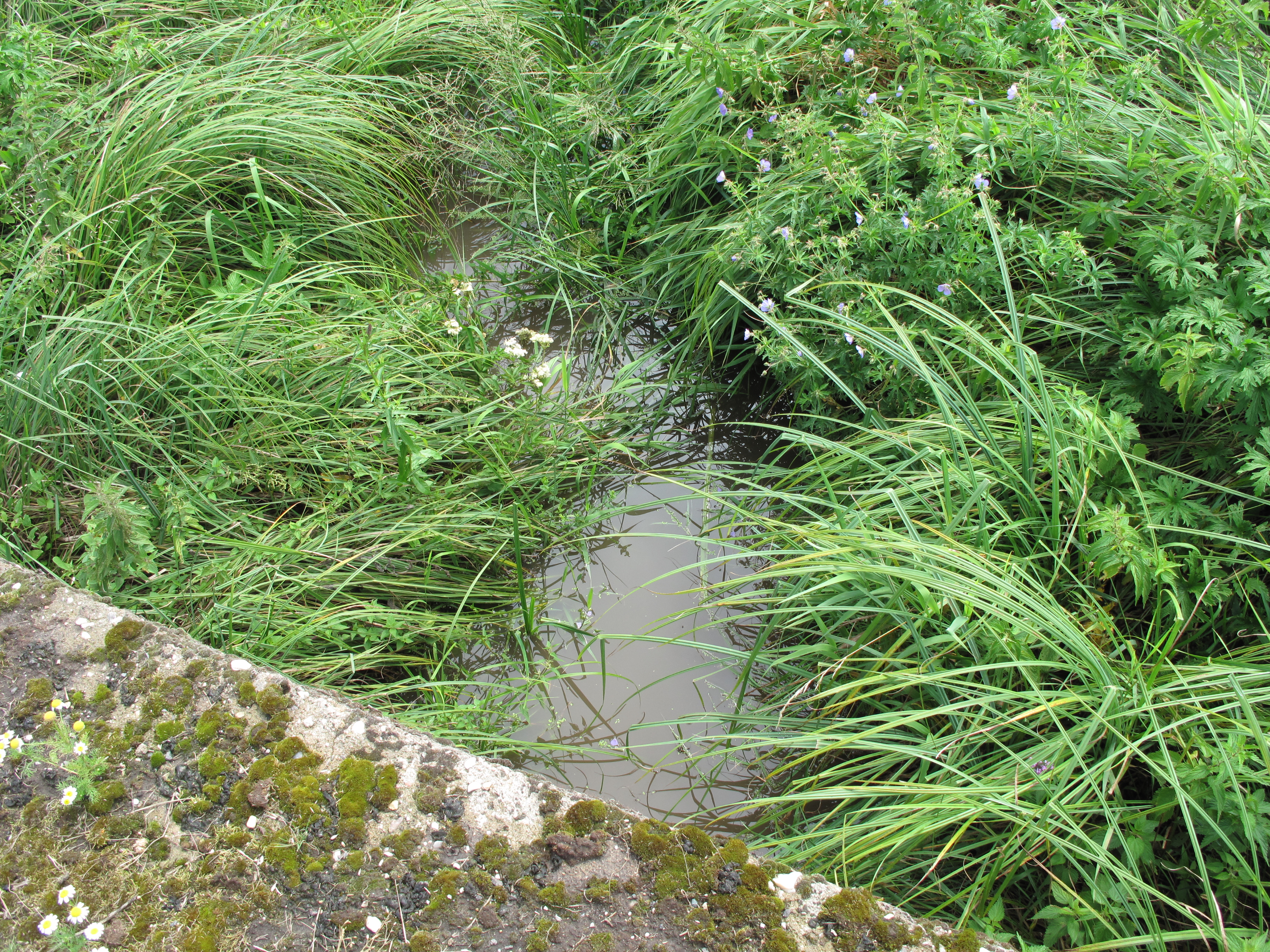 Štítarský potok. Česká republika.